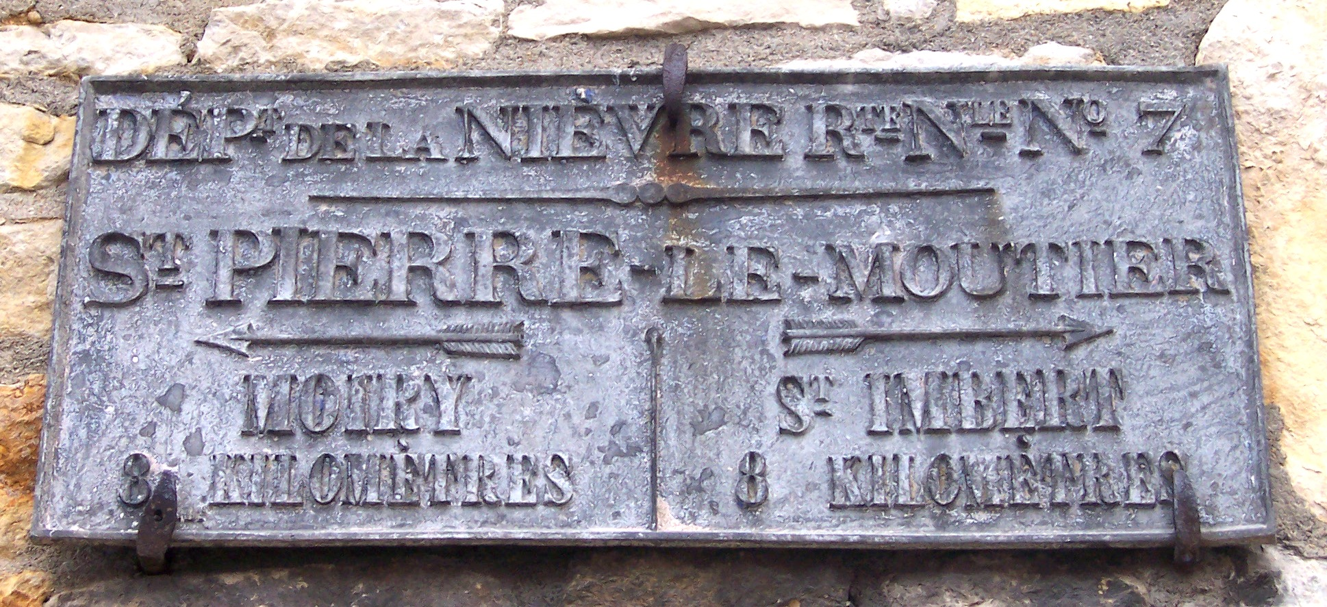 Old sign-post on Route Nationale 7 in Saint-Pierre-le-Moûtier (Nièvre)